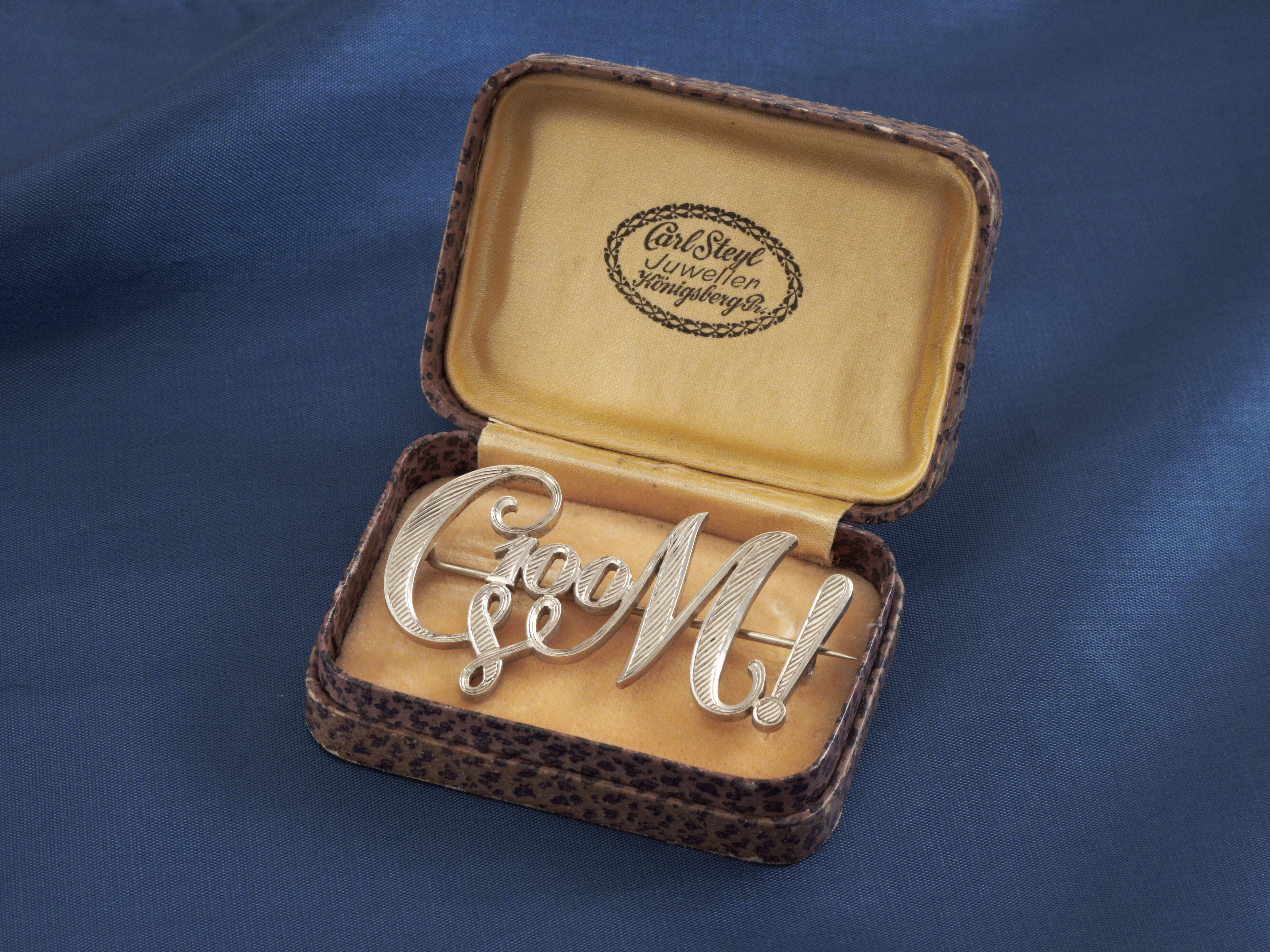 Ehrenzirkel des Corps Masovia für 100 Semester Mitgliedschaft, verliehen an Landwirtschaftsdirektor a. D. Klaus Balduhn (1910–2006), im Besitz von Ministerialrat Rüdiger Balduhn.